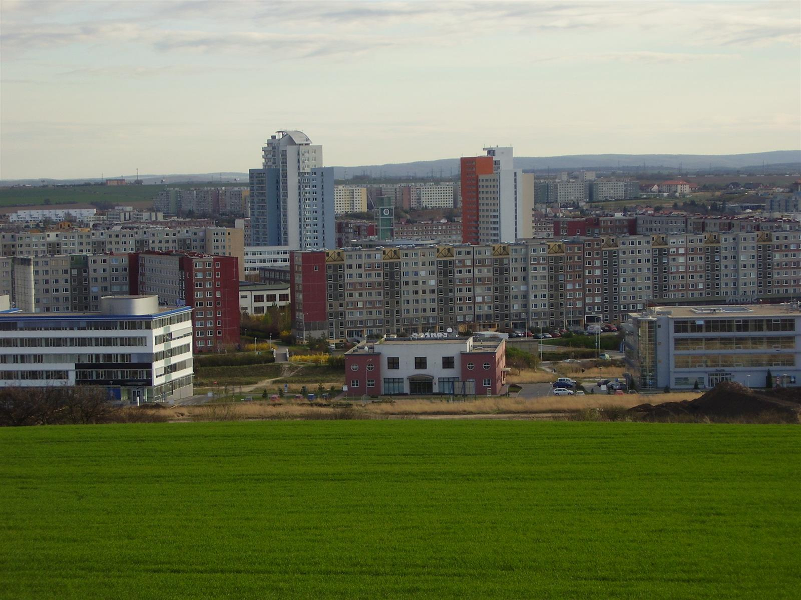 Pohled na Hůrku a Nové Butovice od Vidoule